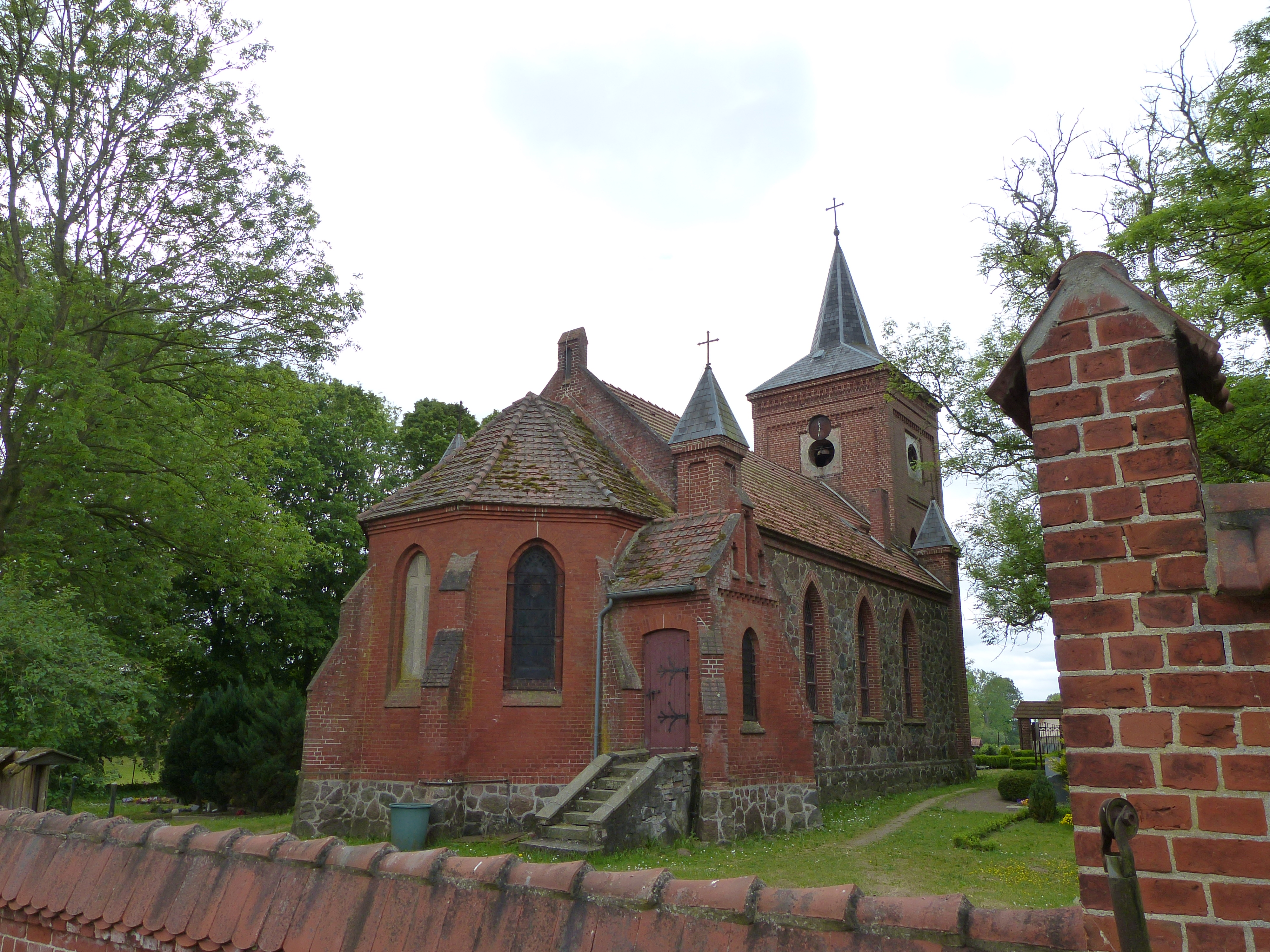 Kirche in Bretwisch, Ansicht von Nordosten